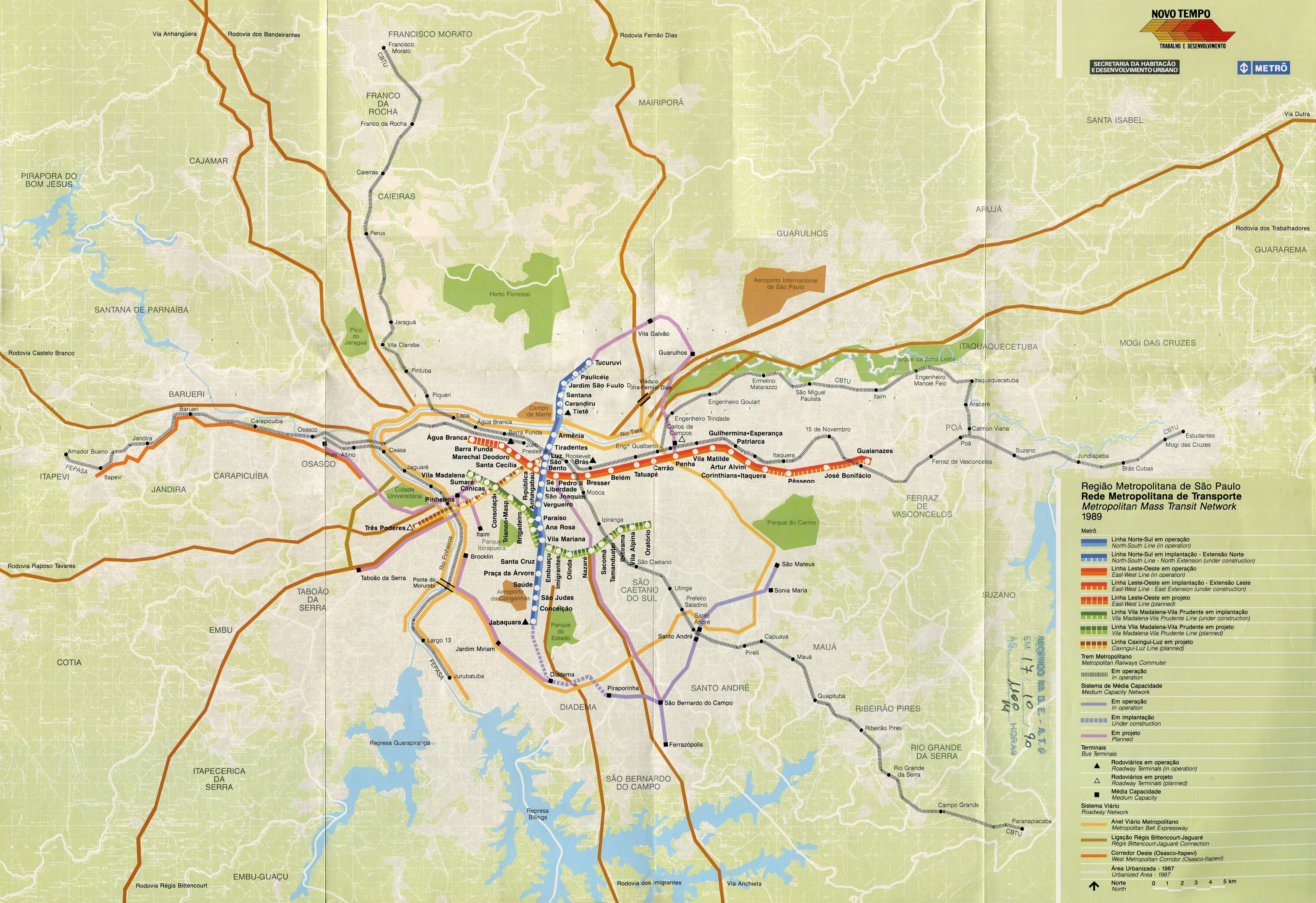 Mapa do transporte público na Região Metropolitana de São Paulo em 1989, contendo as linhas existentes, em obras e em projeto.